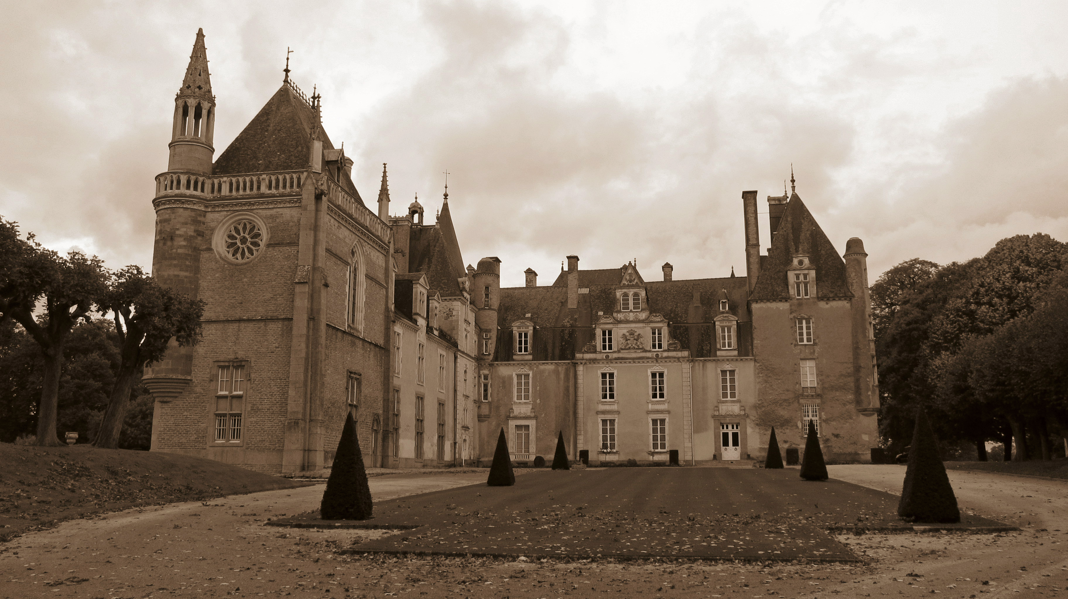 Argentré-du-Plessis (Ille-et-Vilaine, France) : Le château du Plessis.